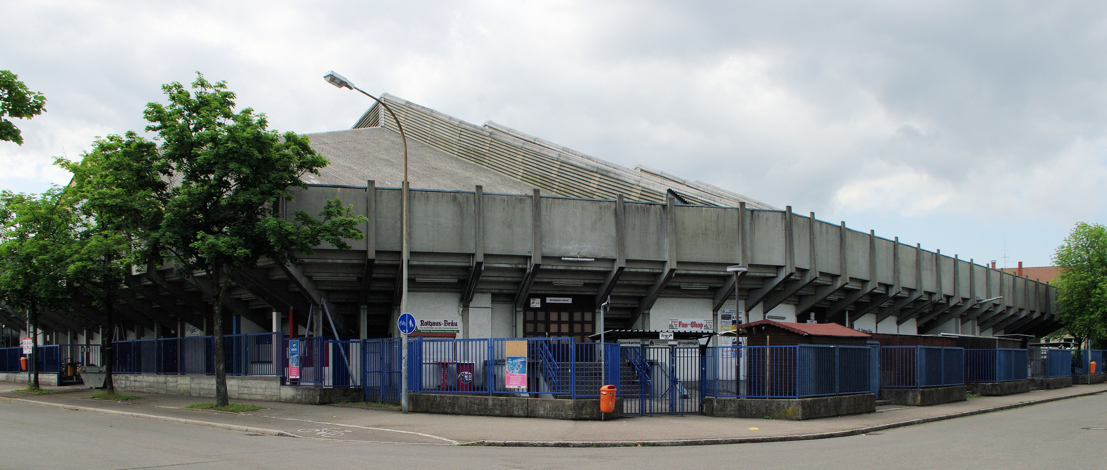 Franz-Siegel-Halle Eissporthalle der Wölfe Freiburg